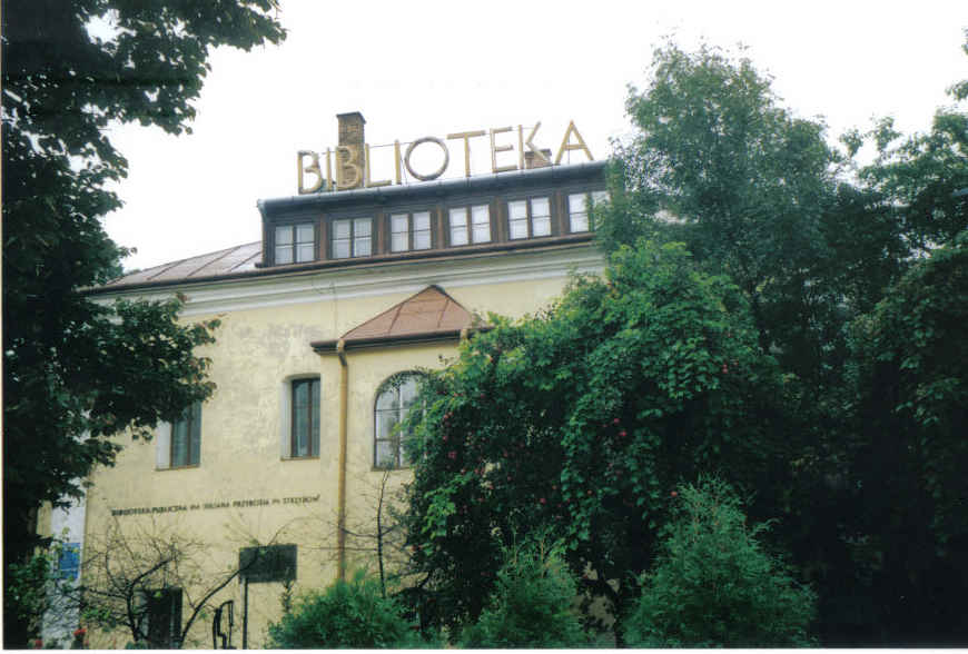 מבנה בית הכנסת בסטז'יז'וב המשמש כיום כספריה